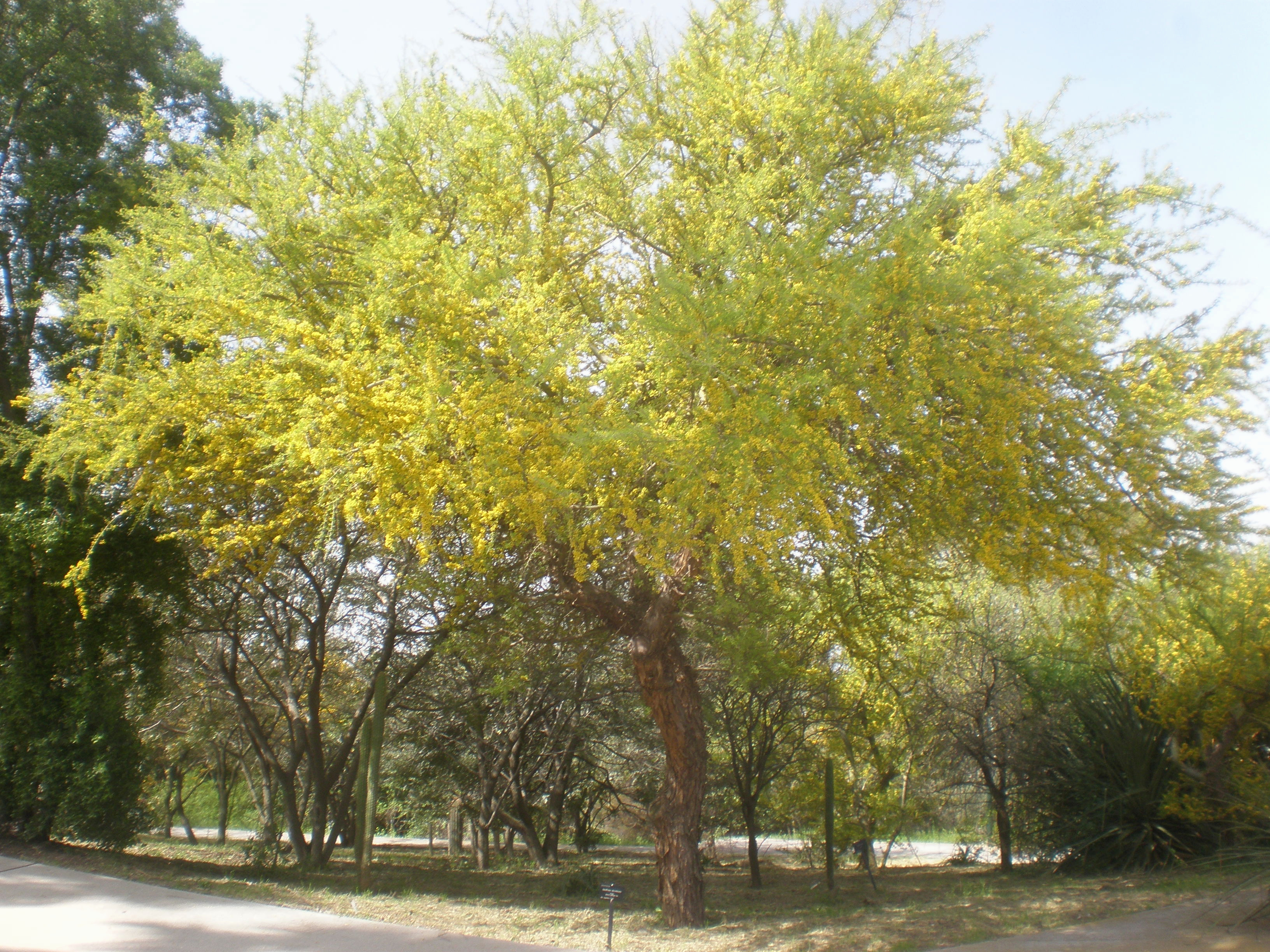 Árbol Geoffroea decorticans.